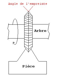 Shéma d'une fraise isocèle.